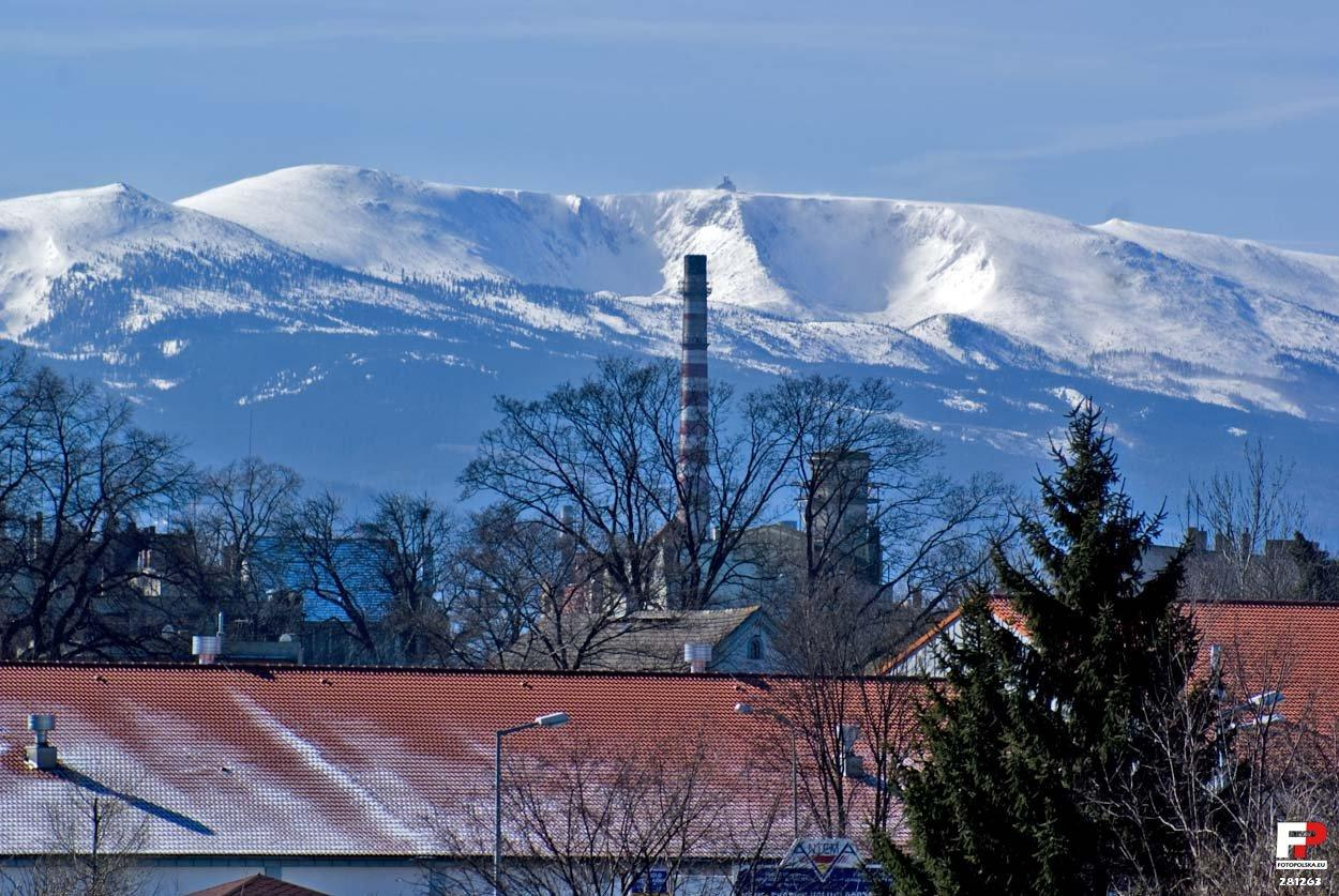 Dachy Jeleniej Góry na tle Śnieżnych Kotłów widziane z estakady.